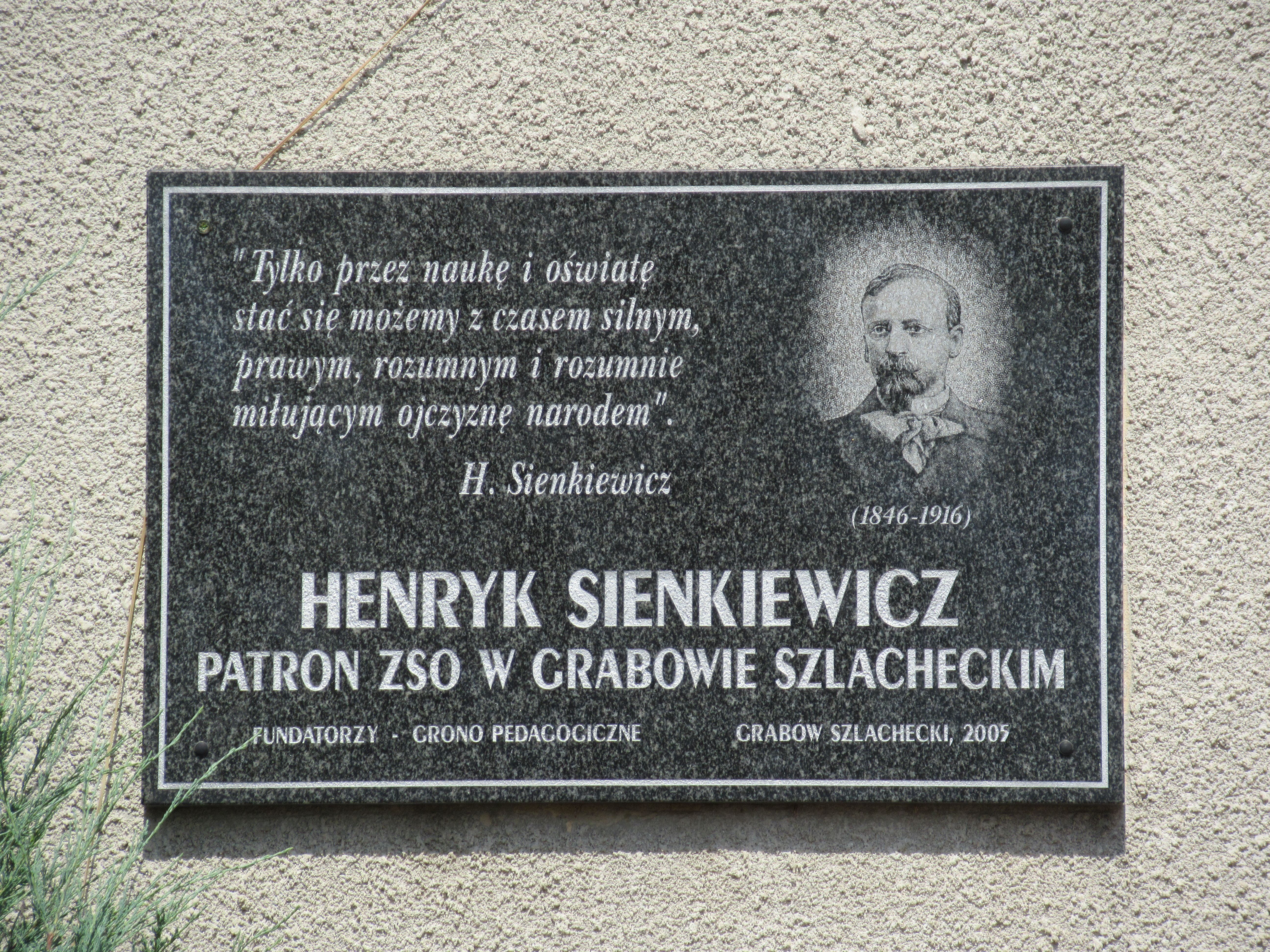 Grabów Szlachecki (pow. rycki, woj. lubelskie, Polska). Tablica poświęcona Henrykowi Sienkiewiczowi na miejscowej szkole.